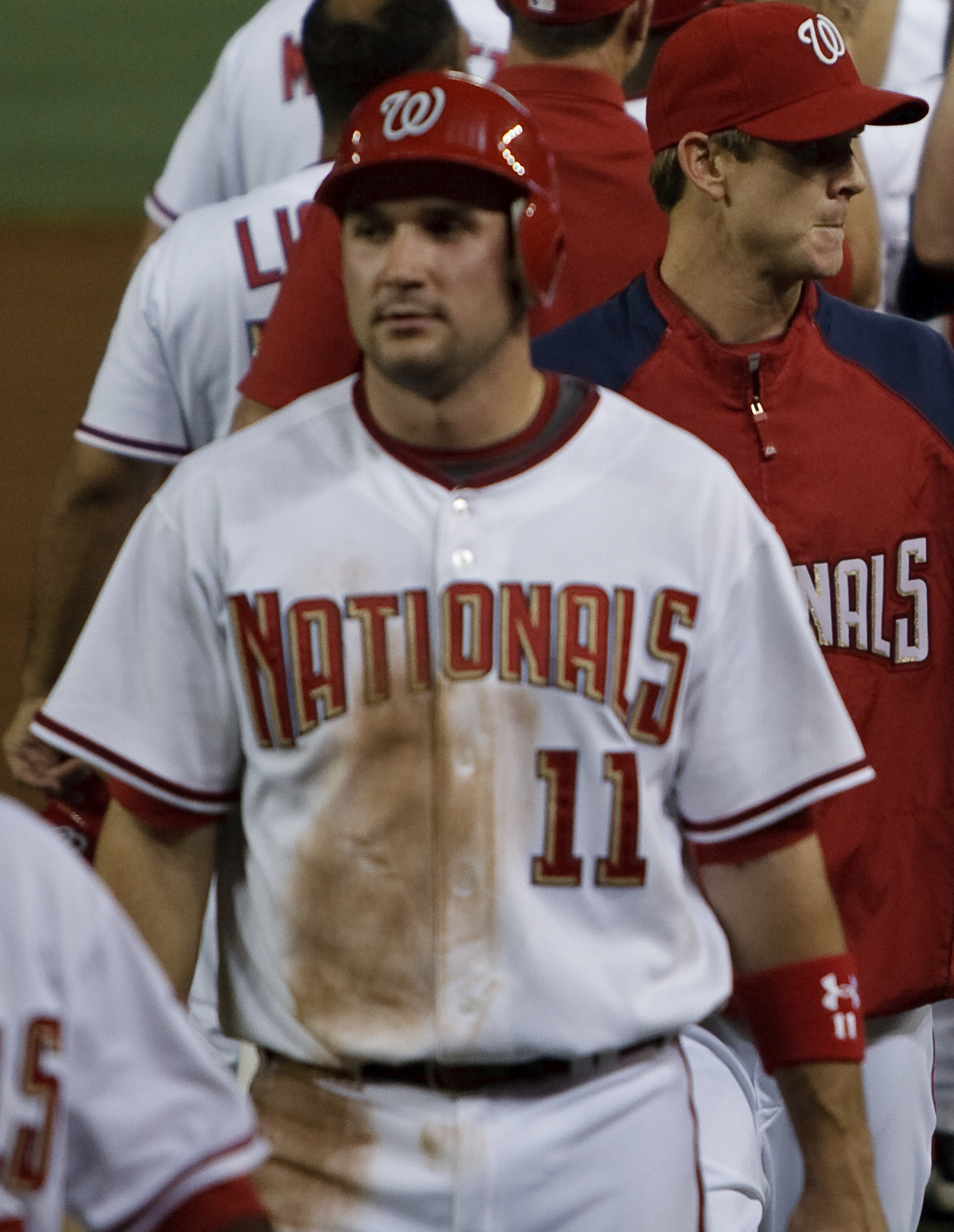 Ryan Zimmerman